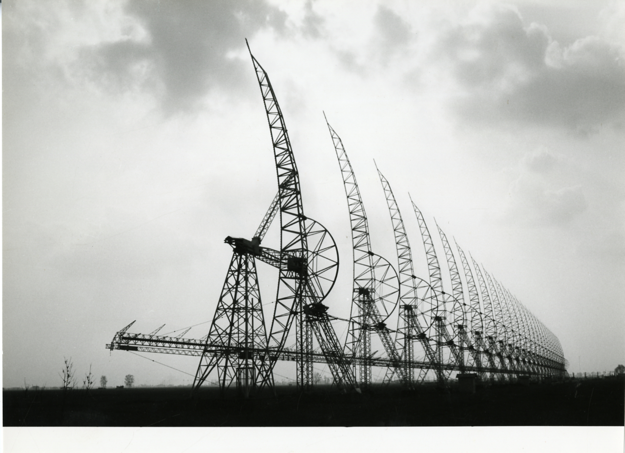 Servizio fotografico : Medicina, 1974 / Paolo Monti. - Stampe: 3 : Positivo b/n, gelatina bromuro d'argento/ carta, 24x30. - ((Al verso delle stampe manoscritti i numeri dei negativi corrispondenti: 1612/22-23, 2525/23. Sul coperchio della scatola, manoscritto a pennarello: "Città Storiche/ Bologna".